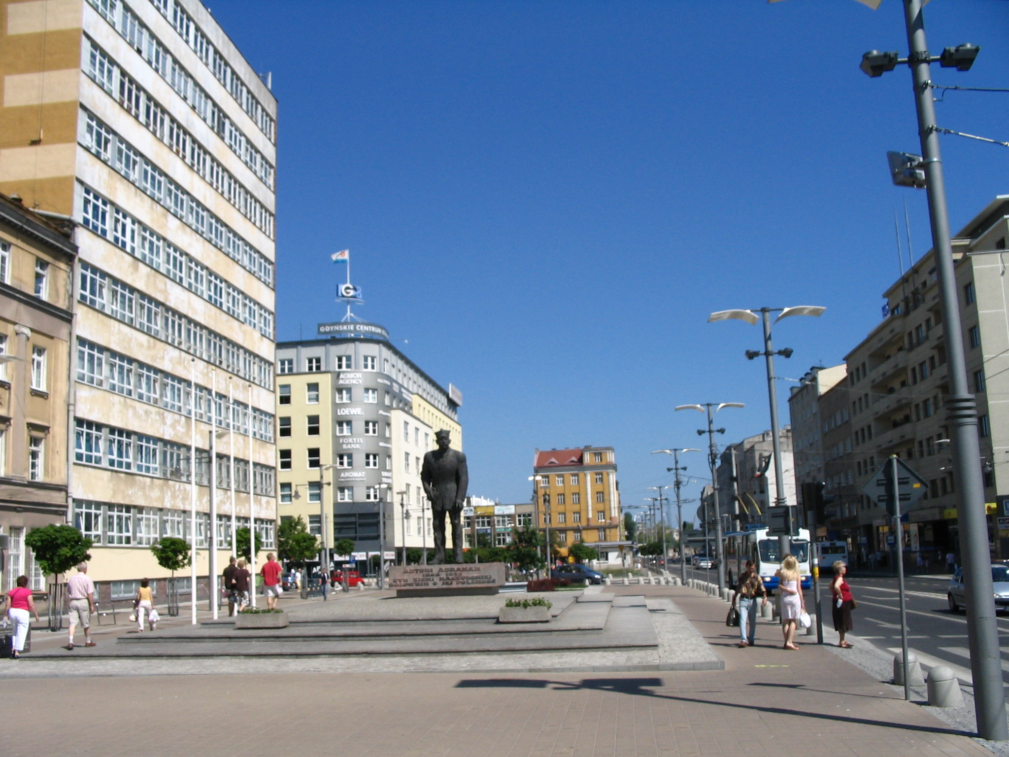 Plac Kaszubski w Gdyni